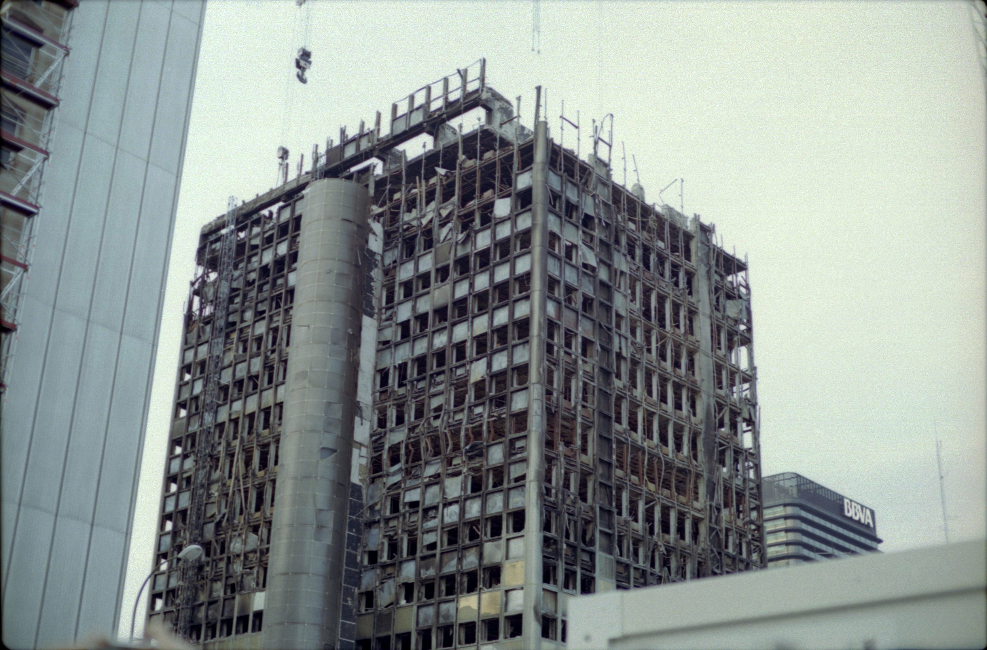 Edificio Windsor (Madrid)